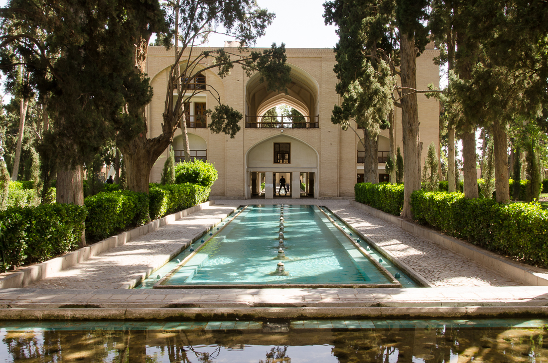 Kashan_2017